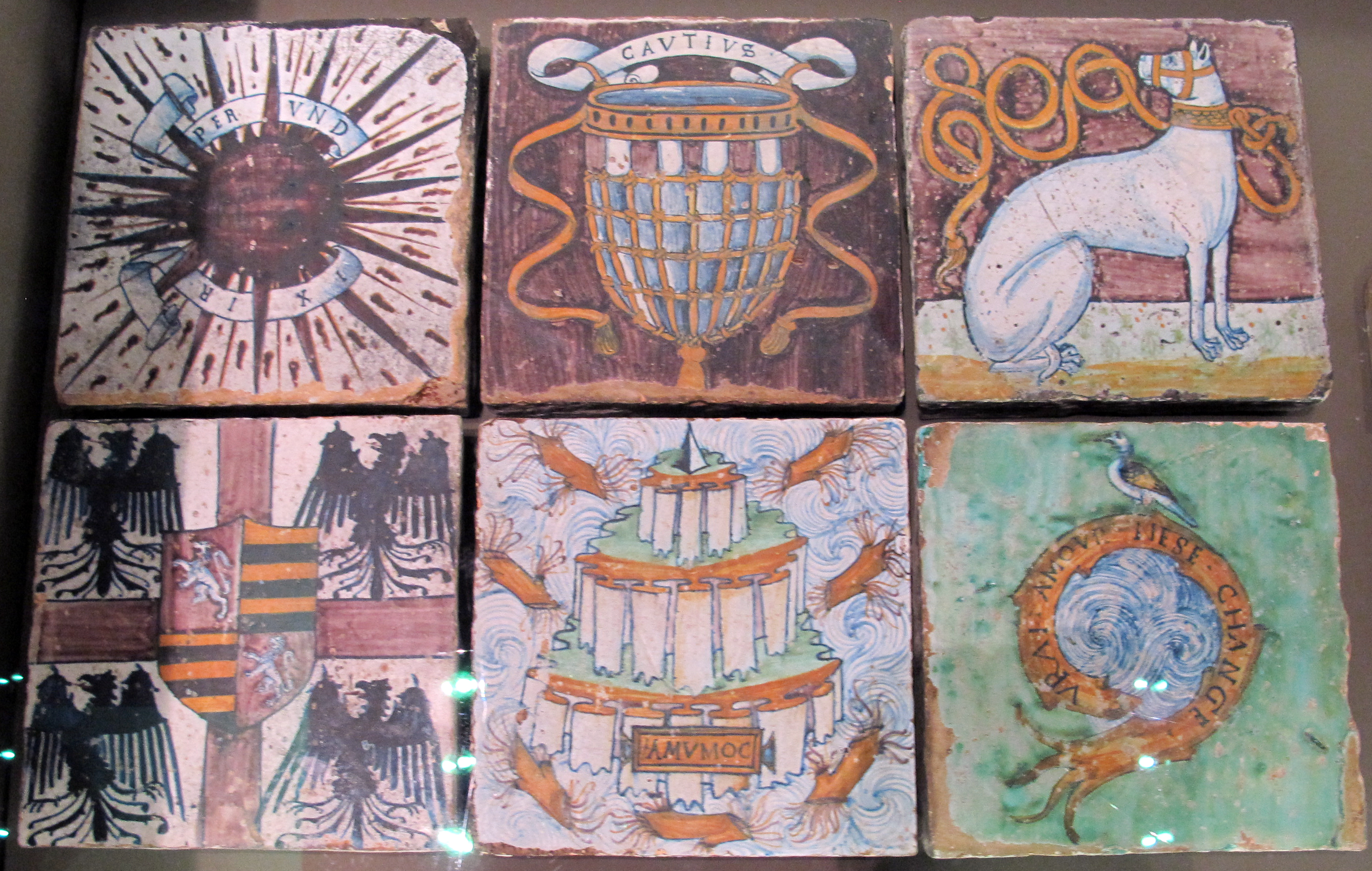 Maiolica del Louvre